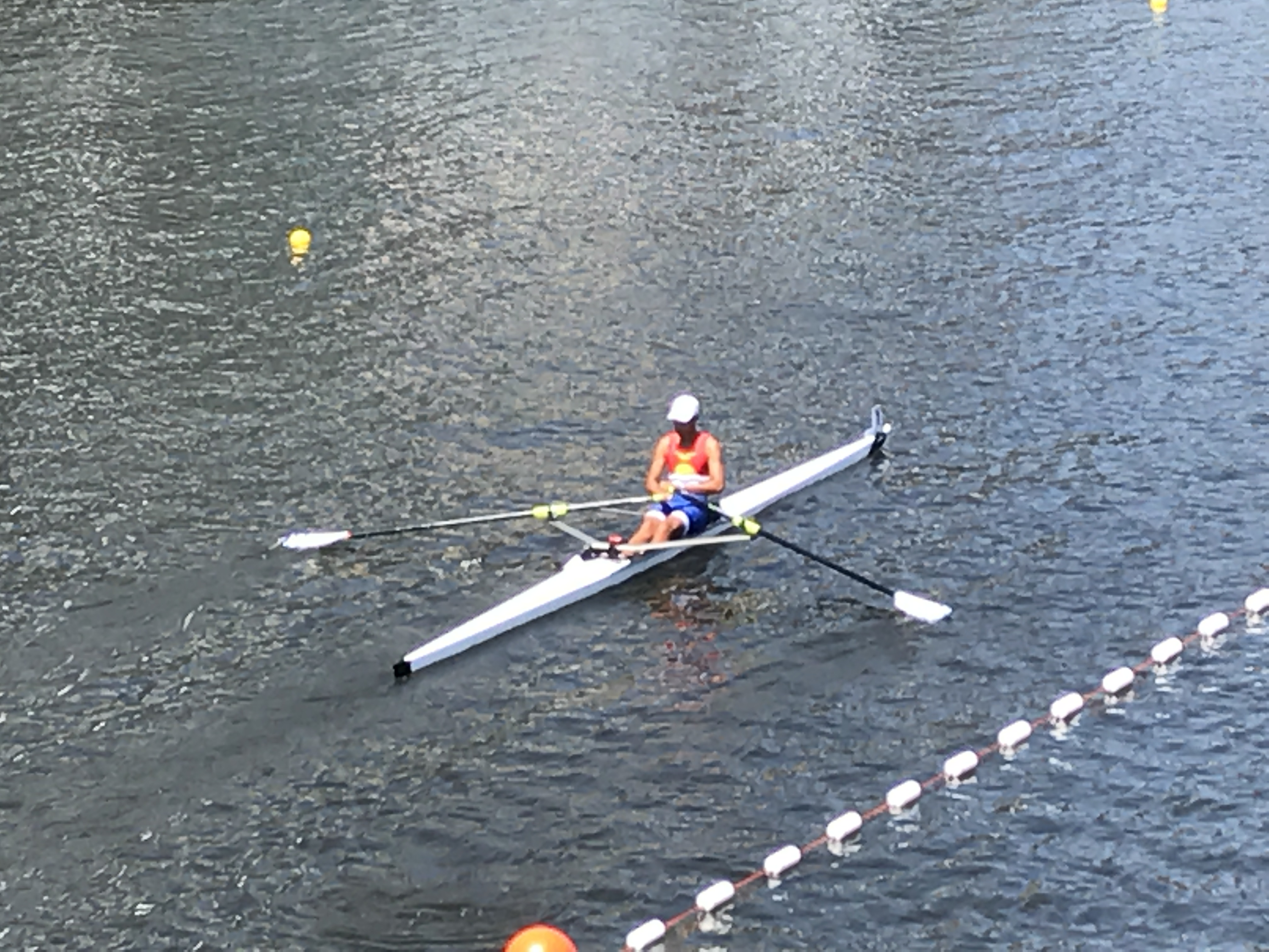 Échauffement